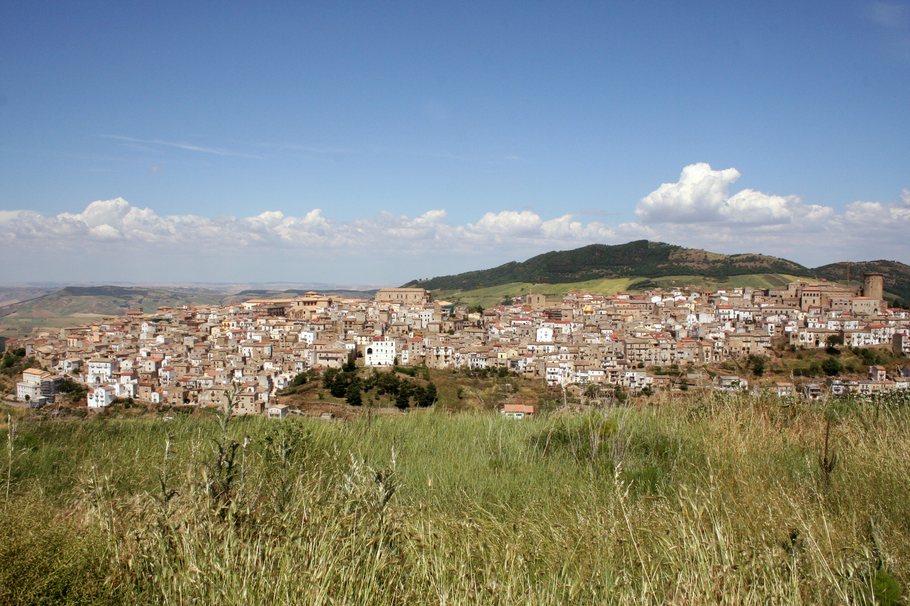 Autore: Rocco Stasi Fonte: fatta da me, sono l'autore Panorama del centro storico dalla stessa angolazione della stampa seicentesca, anche se in posizione più arretrata. Licenza d'uso: GFDL, sono l'autore.